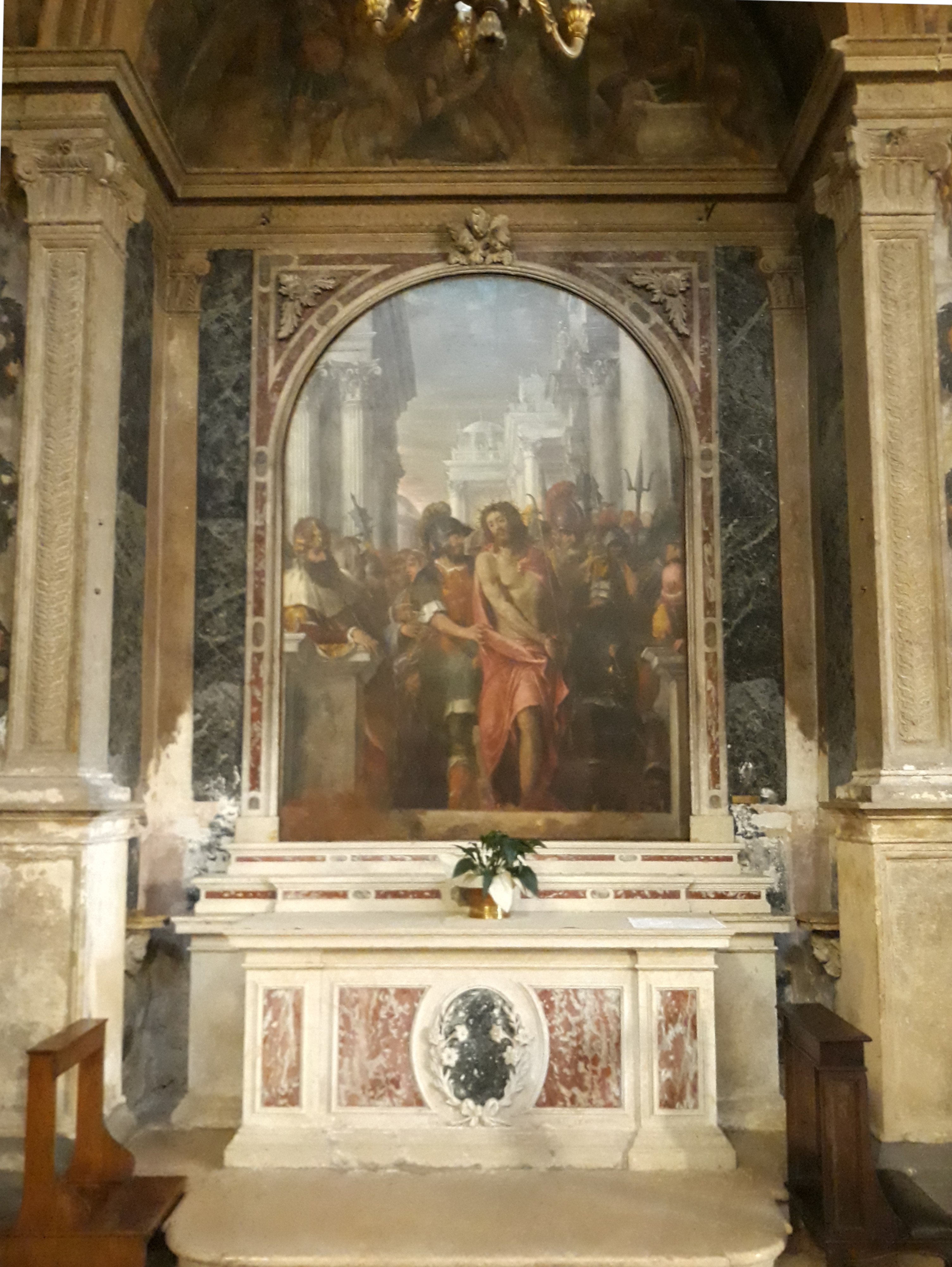 Altare laterale della chiesa di san Nazaro e Celso a Verona con pala Ecce Homo (1560 circa) di Orlando Flacco